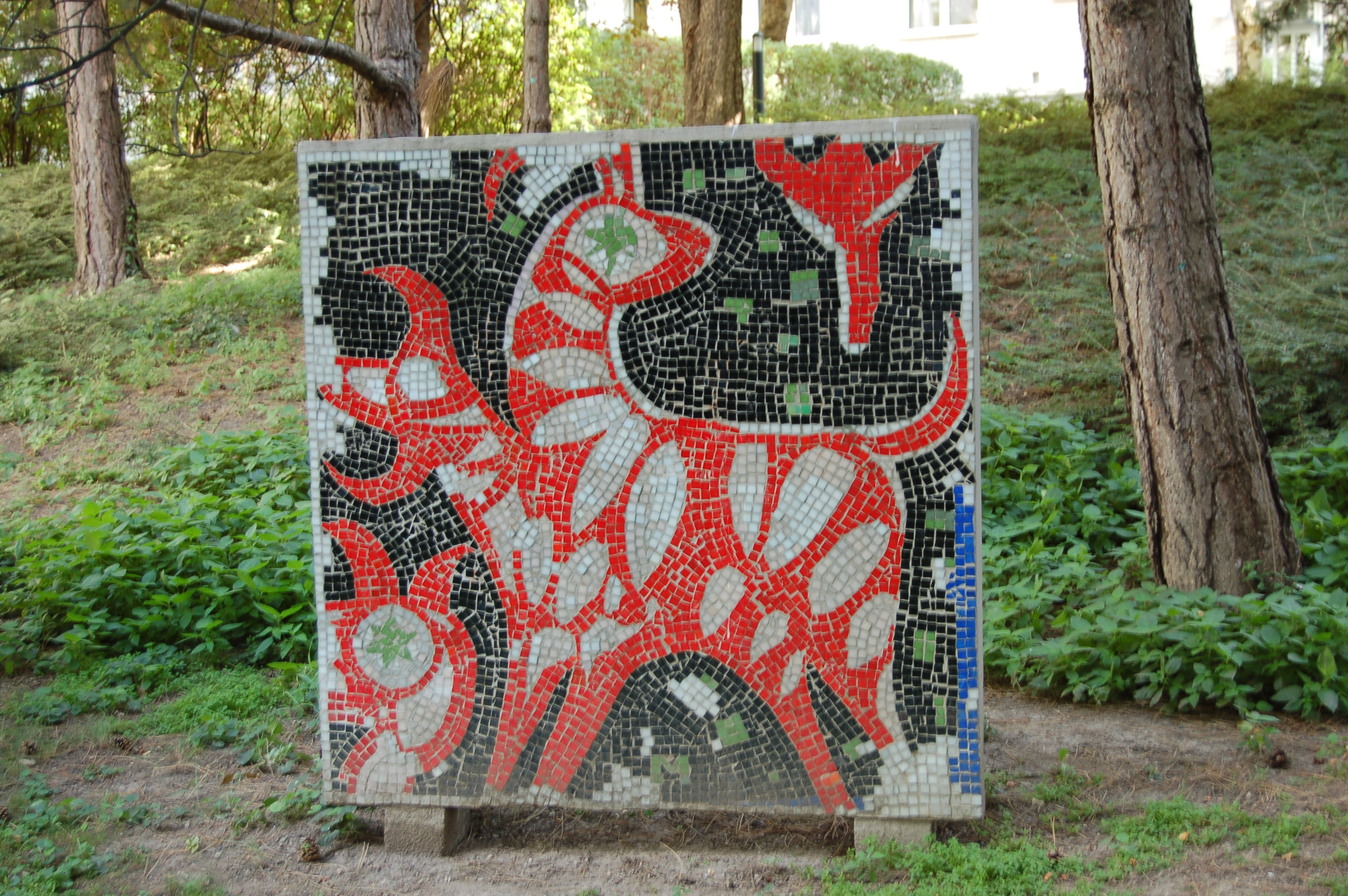 Das Mosaik im Karl-Honay-Hof (Wien-Ottakring) befindet sich an einer frei stehenden Betonwand im Innenhof des Gemeindebaus. Es wurde zwischen 1960 und 1967 von Maximilian Melcher geschaffen.